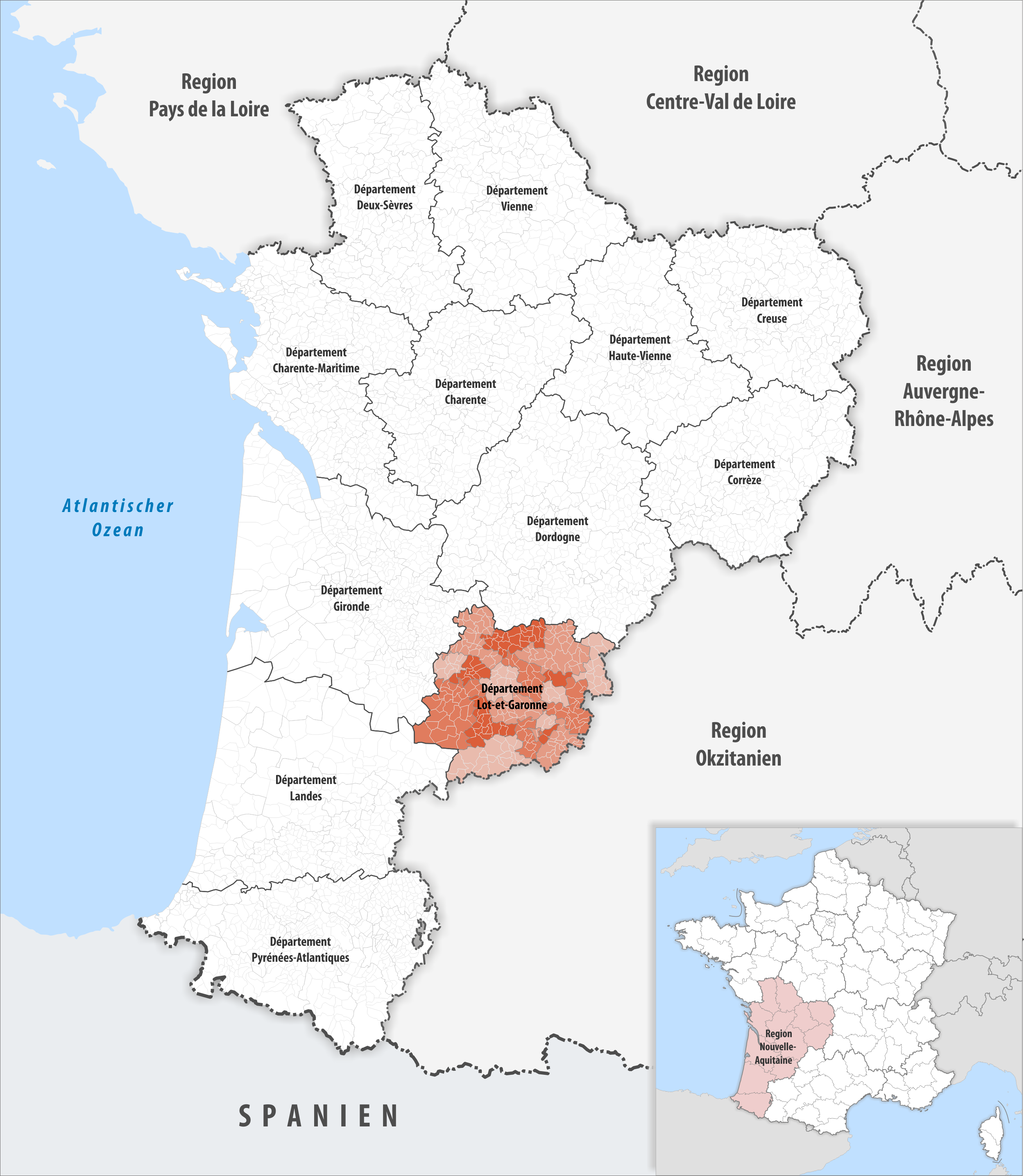 Lage des Departements Lot-et-Garonne